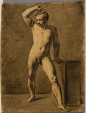 Pierre noire, fusain et estompe avec rehauts de craie blanche sur papier beige